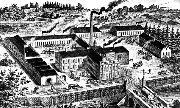 Zeichnung der Eisenhütte Prinz Rudolph ca. 1880